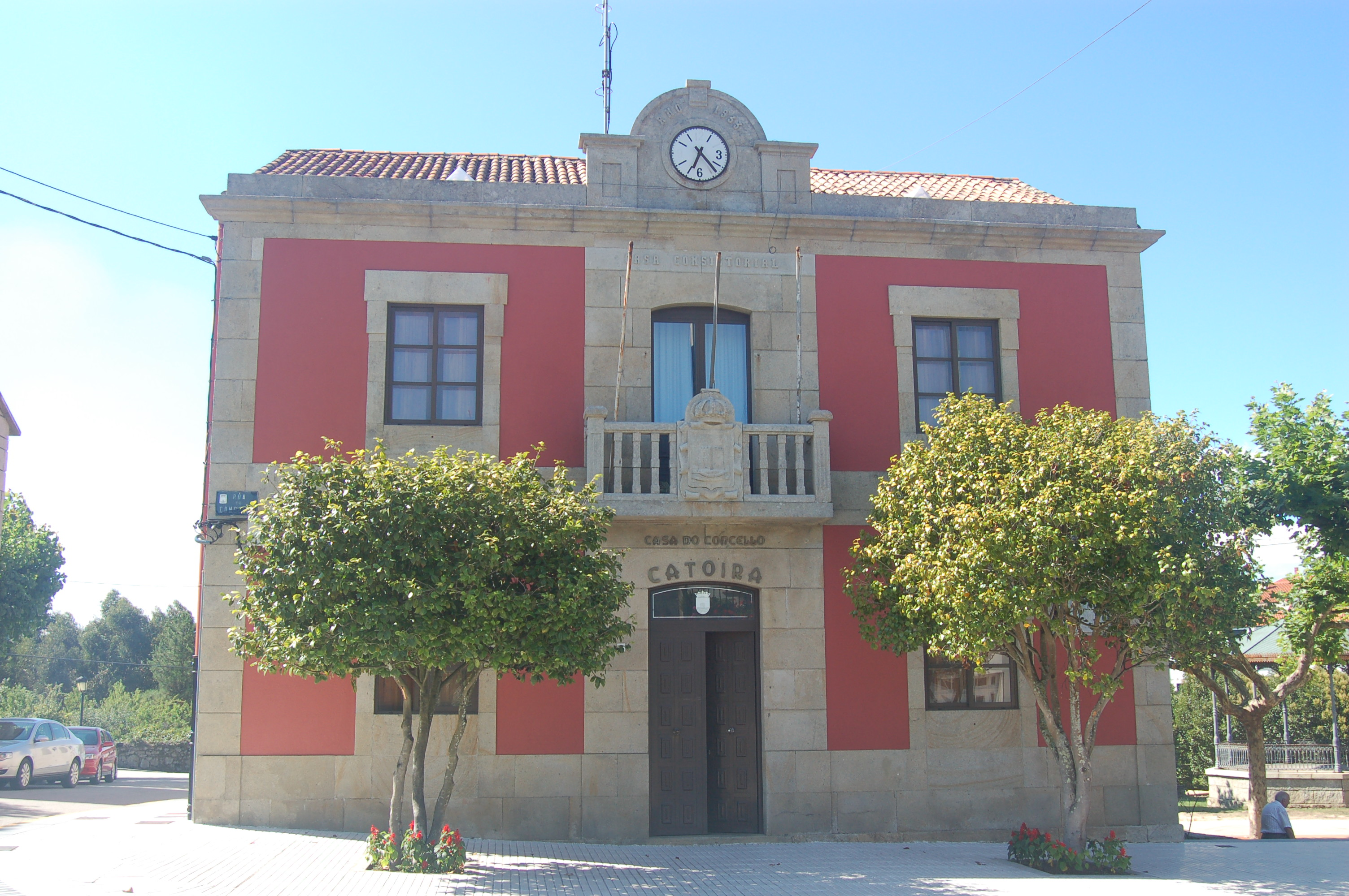 Casa consistorial de Catoira